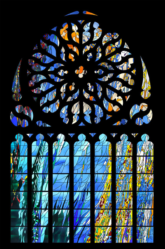 Grand vitrail Saint Trémeur Carhaix